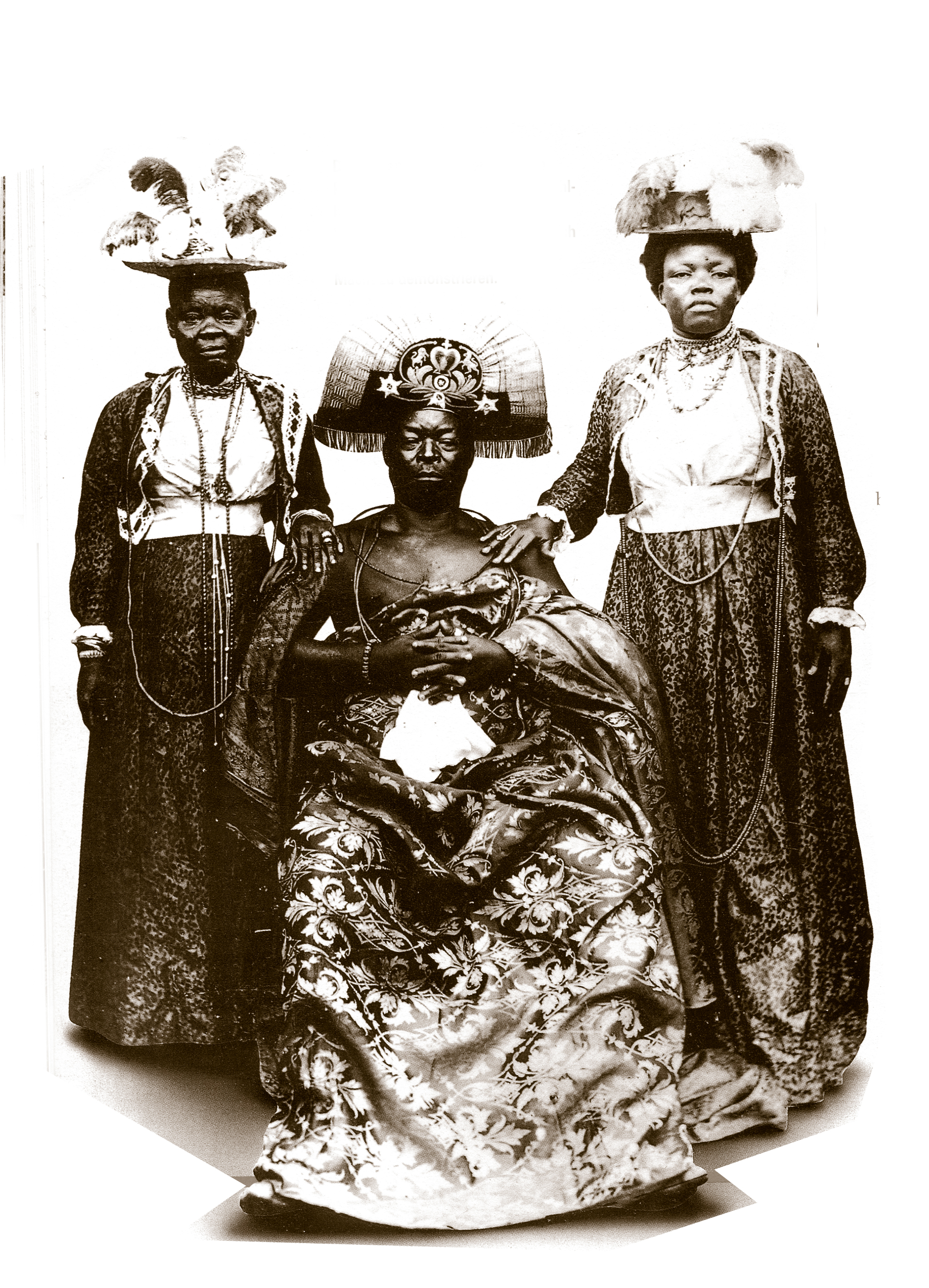 Нигер.Местный царёк с семейством